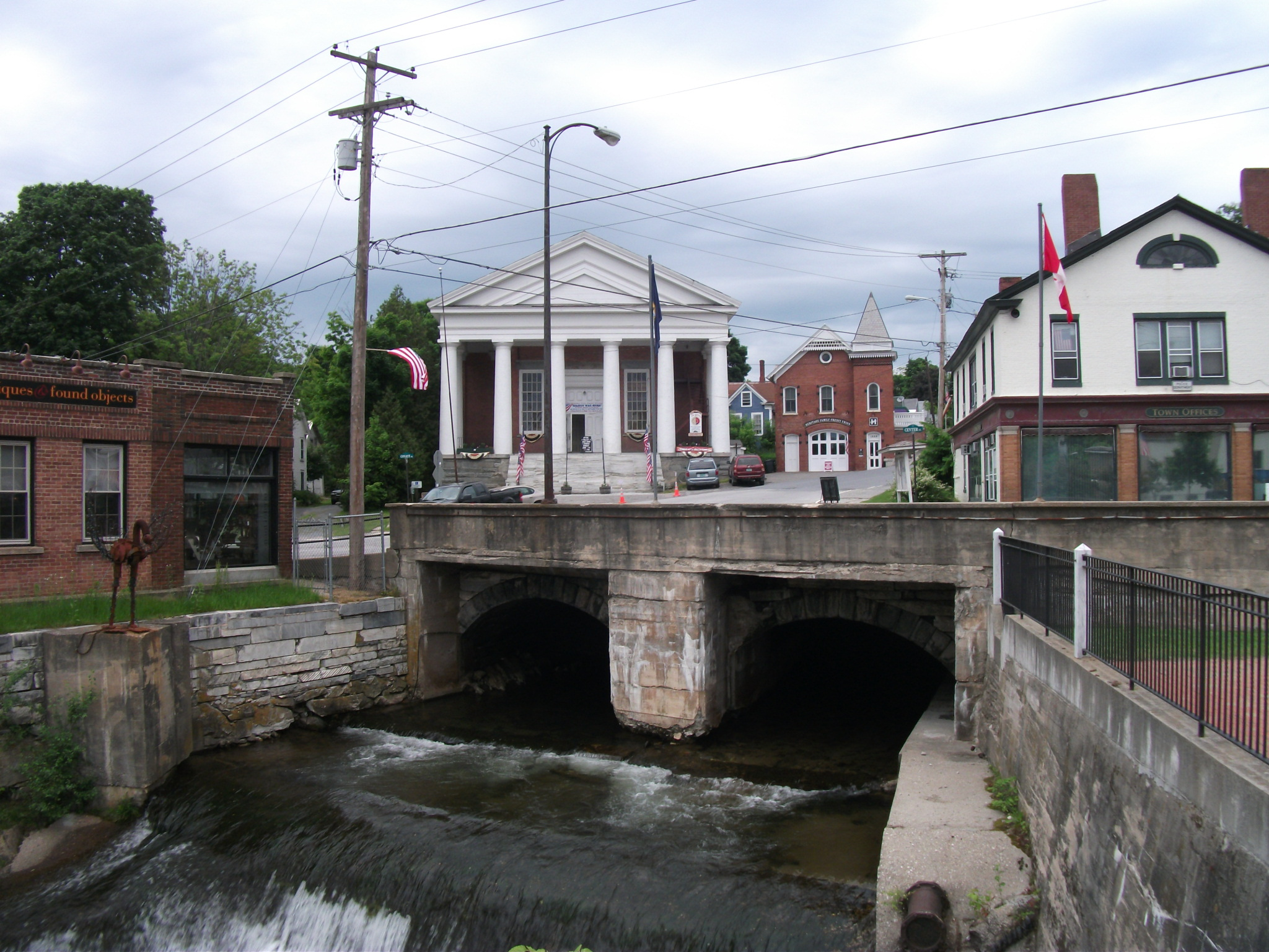 Bridge in Brandon, Vermont